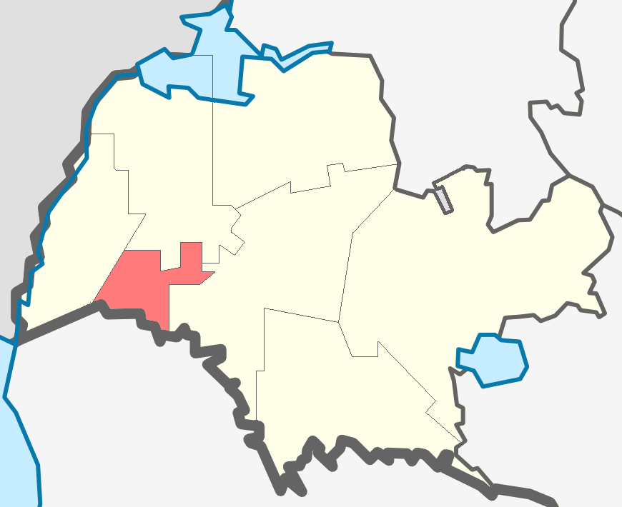 Гостицкое сельское поселение на карте Сланцевского района